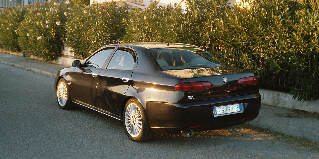 Alfa Romeo nuova 166 (vista di tre quarti posteriore).